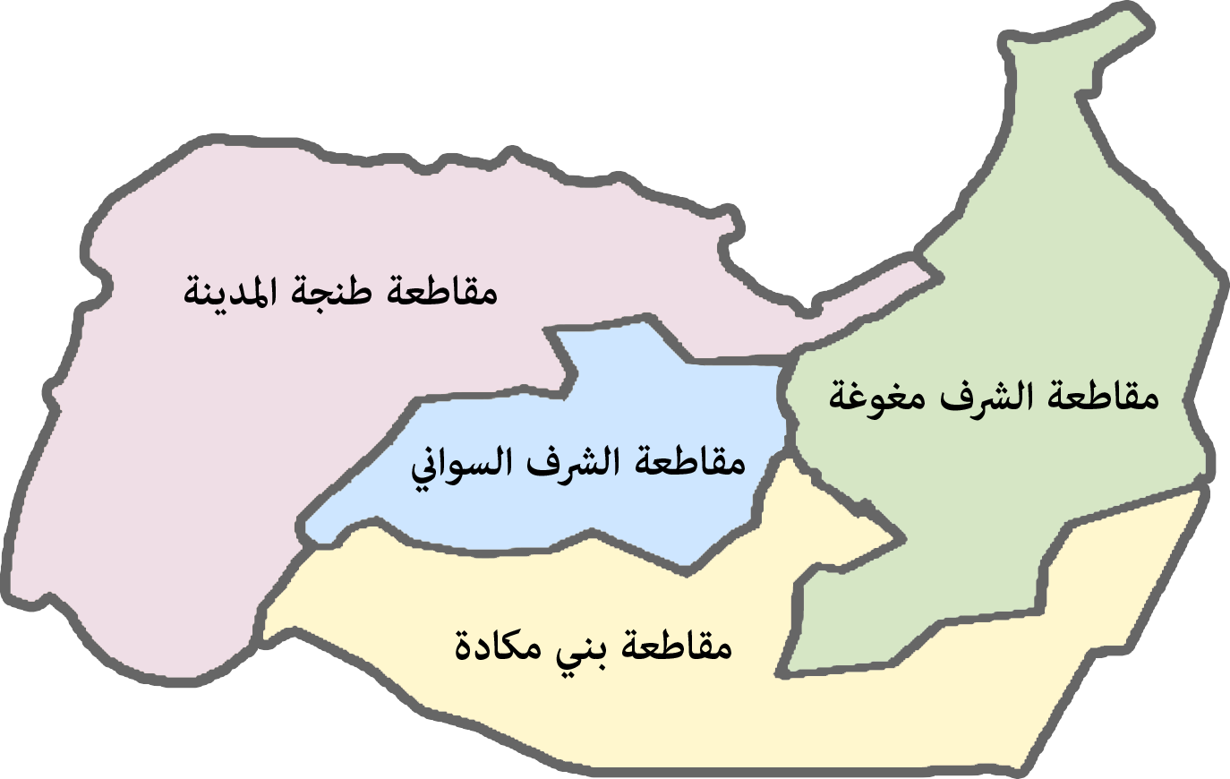 خريطة توضح المقاطعات الأربع لمدينة طنحة